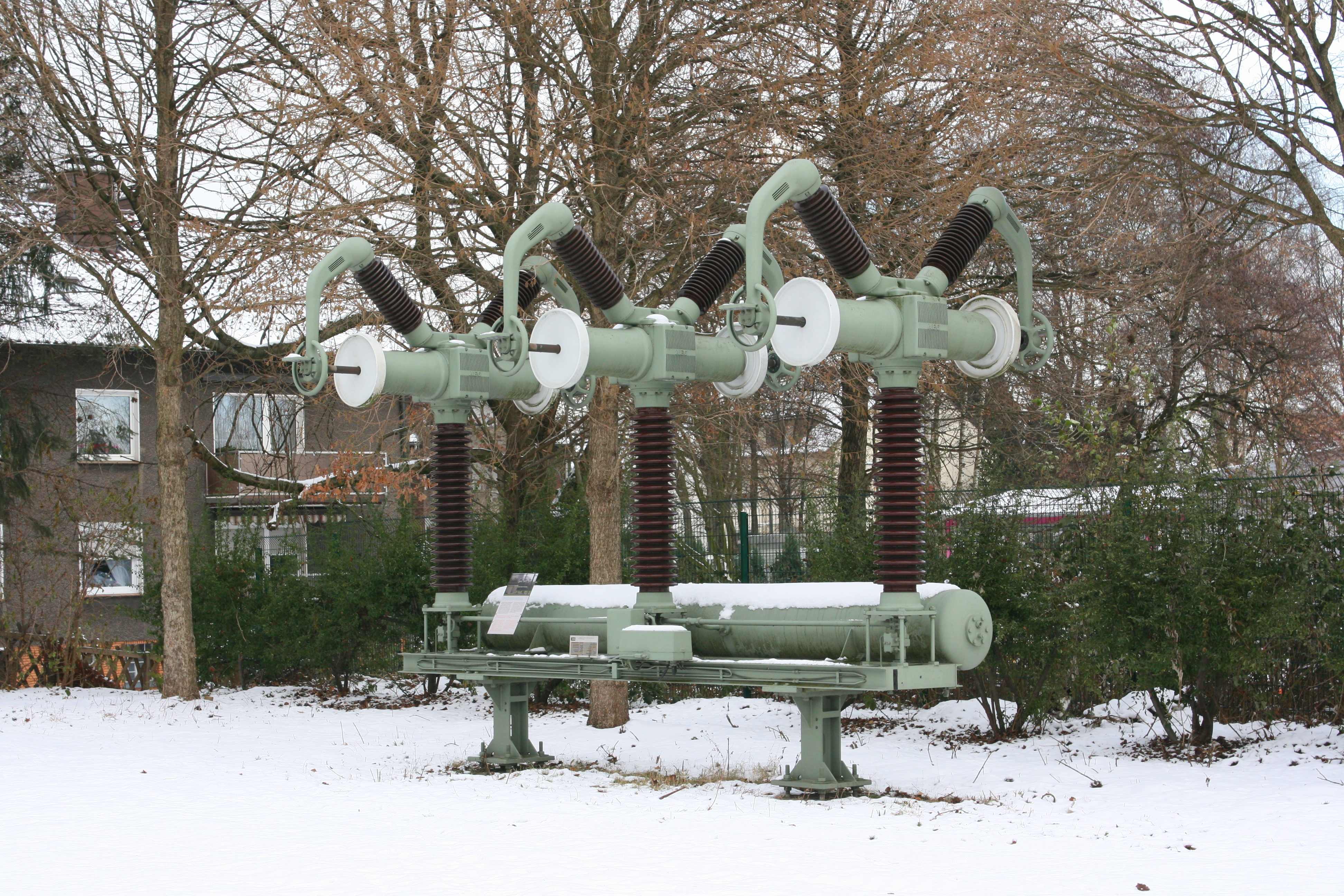 Umspannwerk Recklinghausen, Uferstraße 2-4 in Recklinghausen